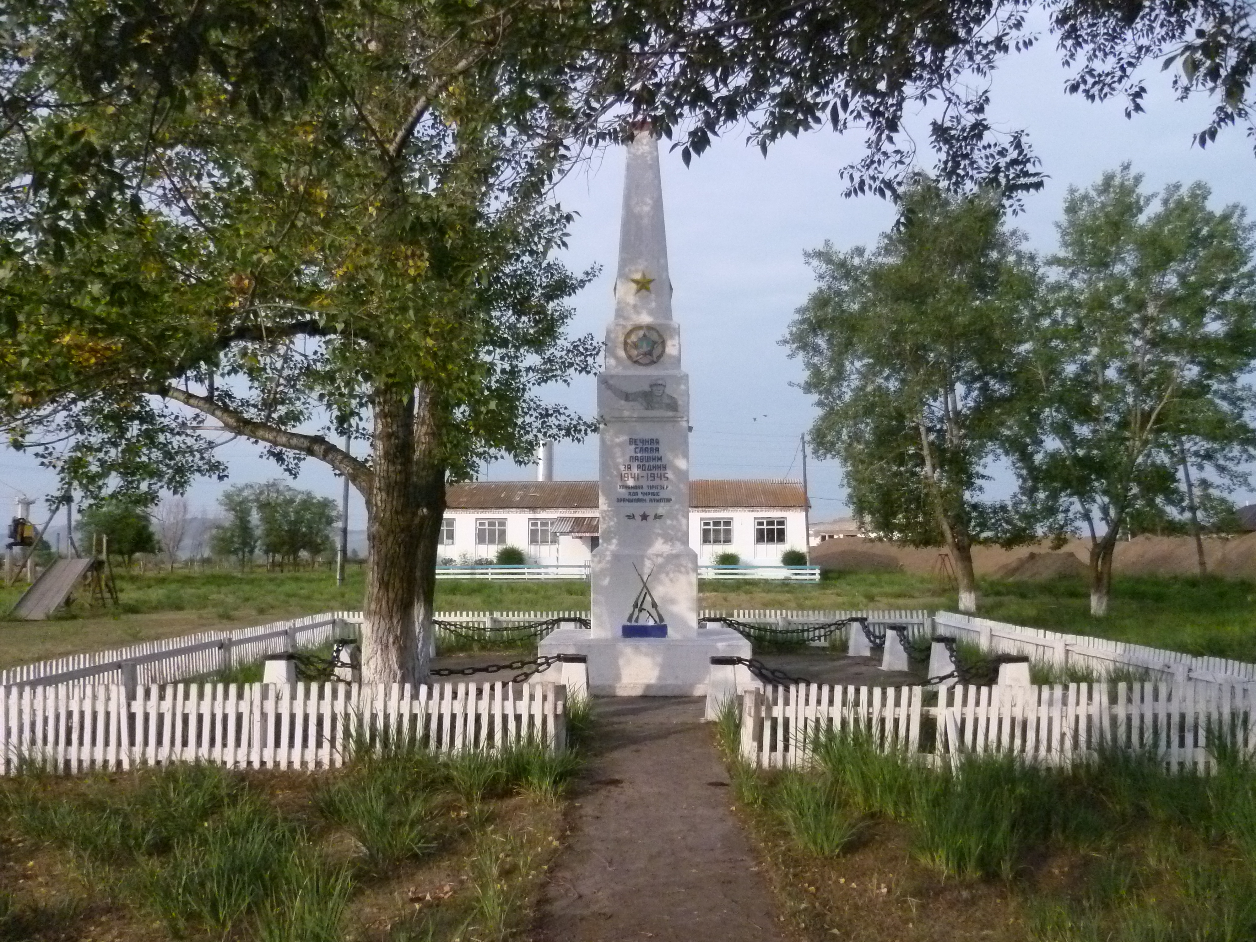 Памятник Победы в селе Усть-Есь, Хакасия